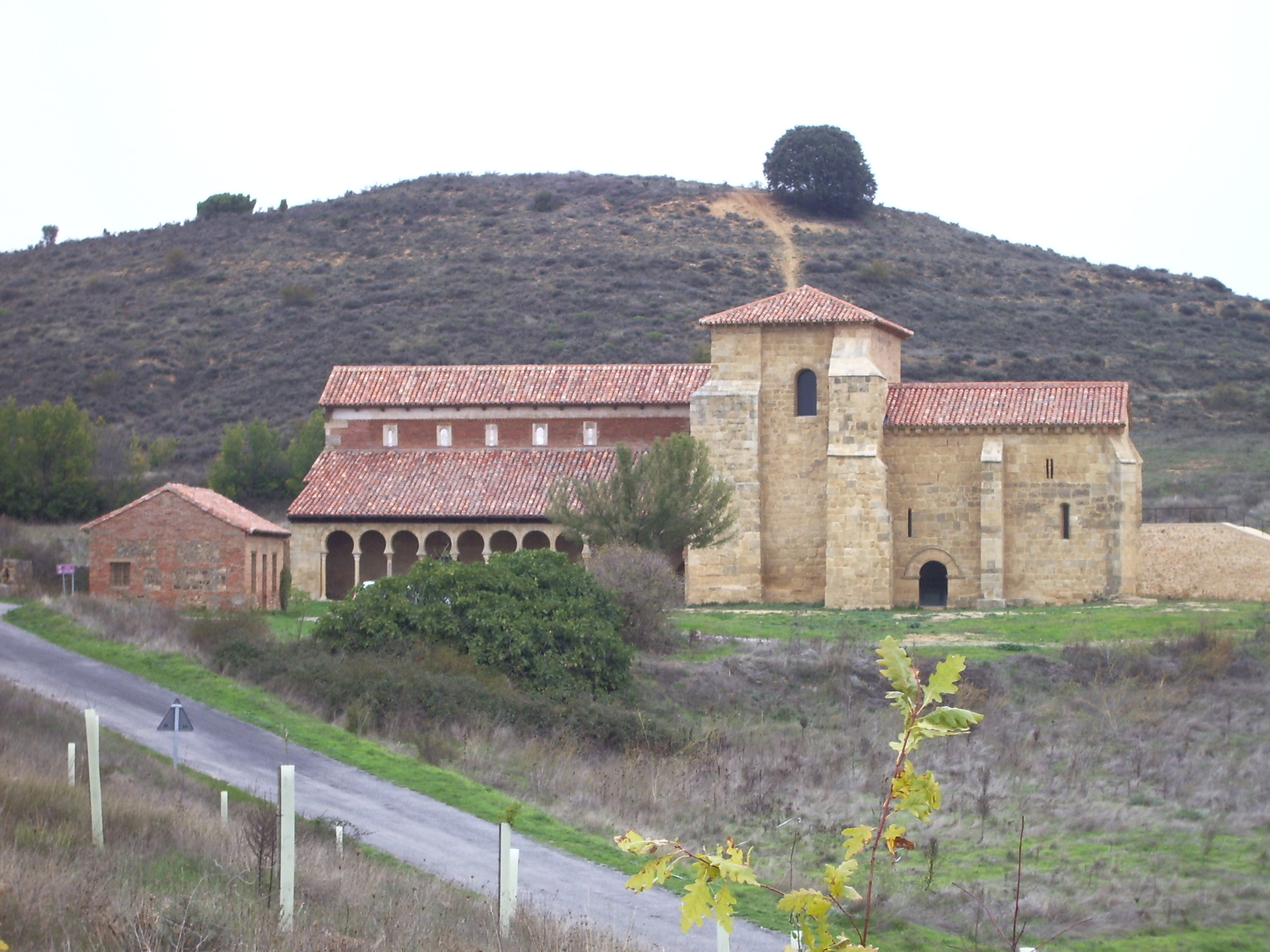 San Miguel de Escalada bei Leon